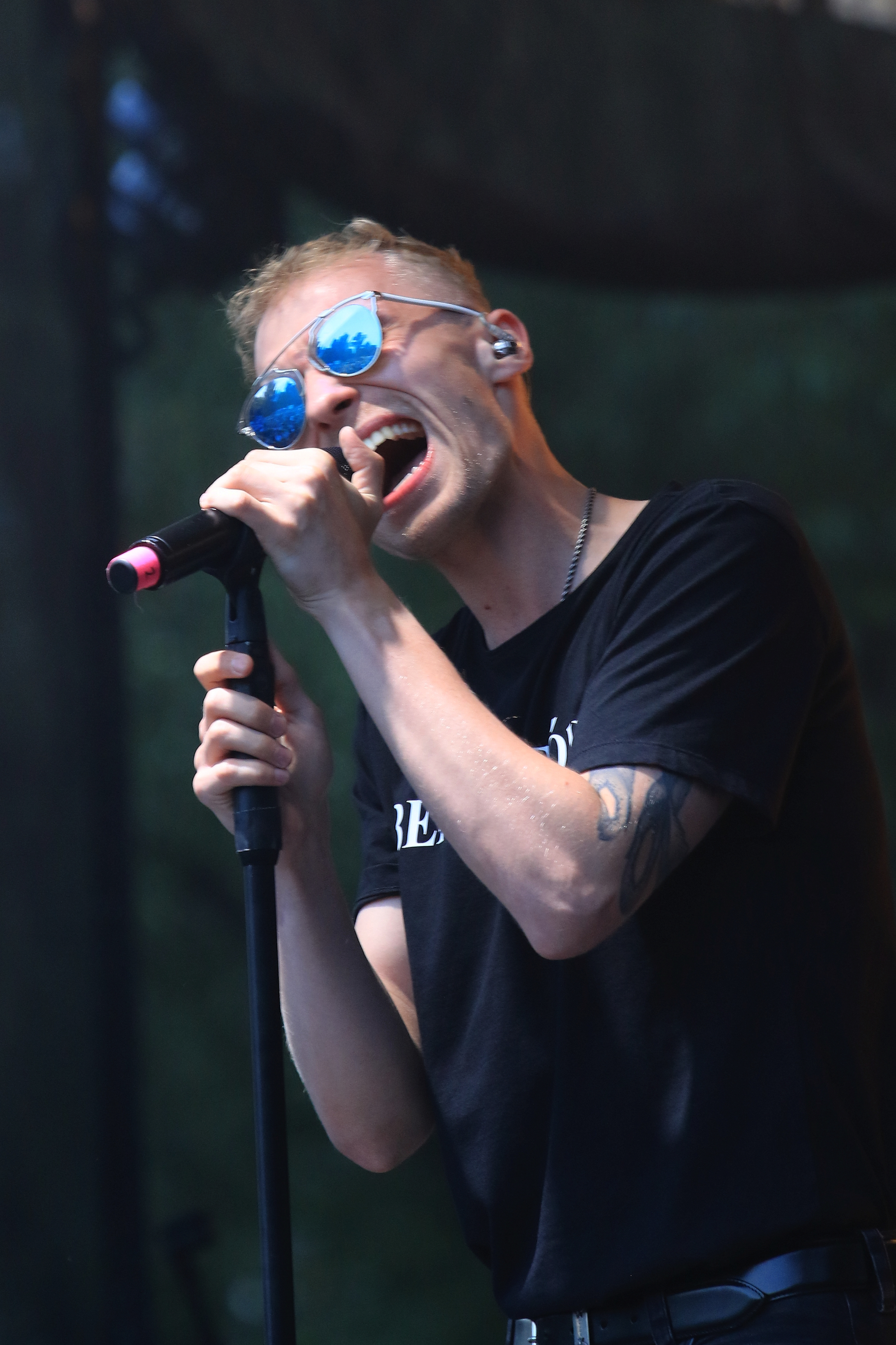 Igor Herbut z zespołu Lemon podczas koncertu na 40. Dniach Bełchatowa 29 czerwca 2019